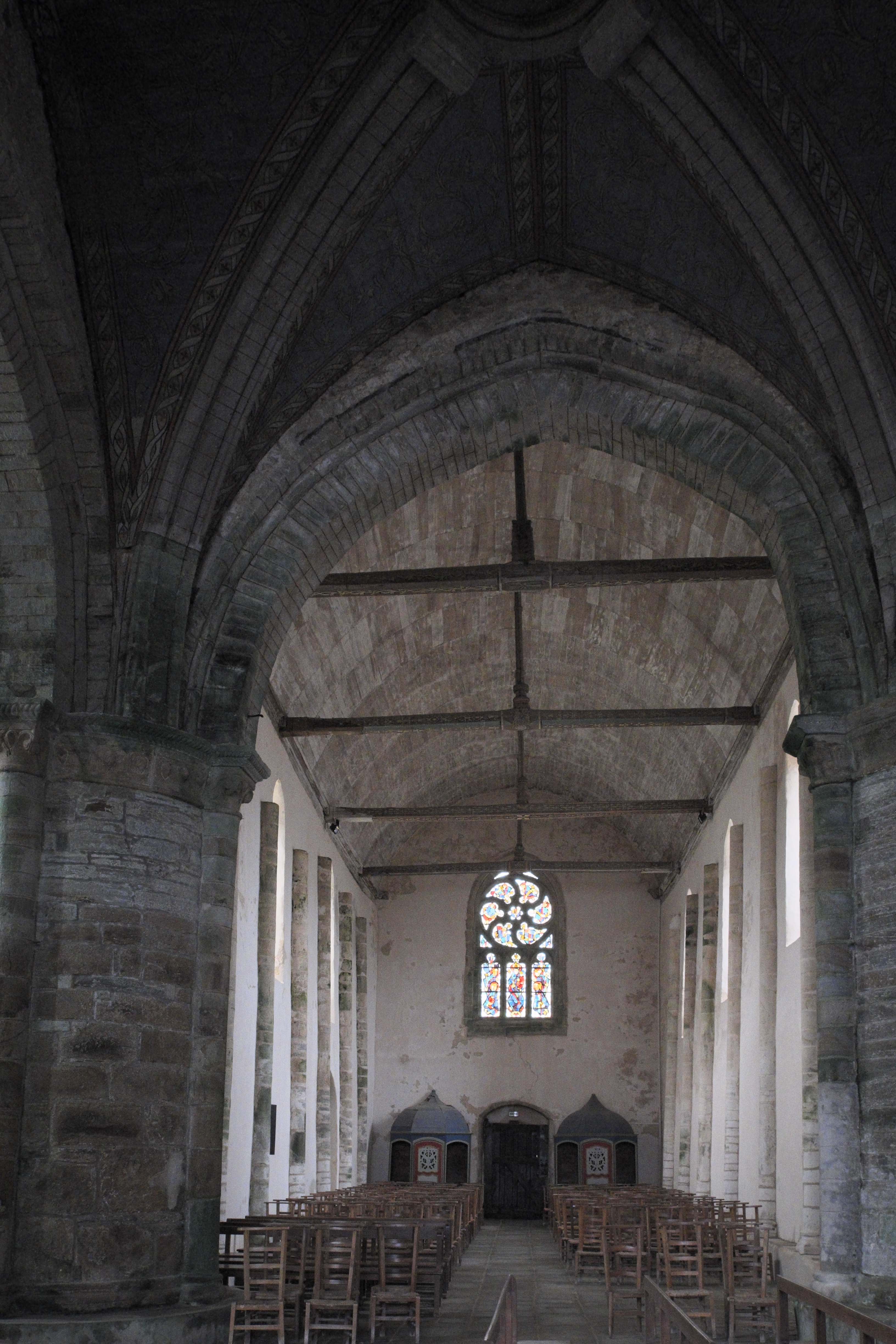 Kapelle Notre-Dame-de-Kernitron in Lanmeur im Département Finistère (Region Bretagne/Frankreich), Innenraum